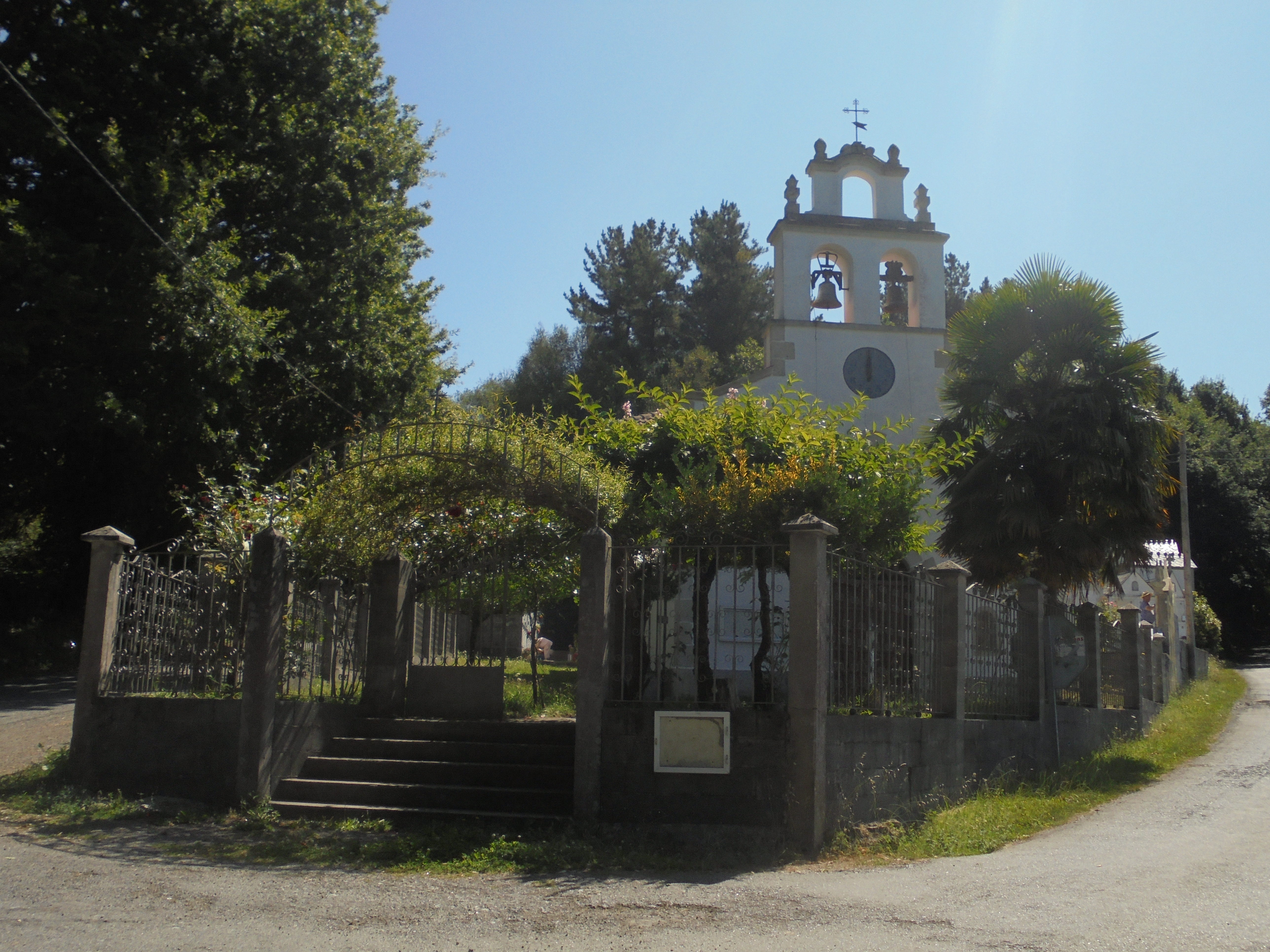 Igrexa de Sobrado de Picato